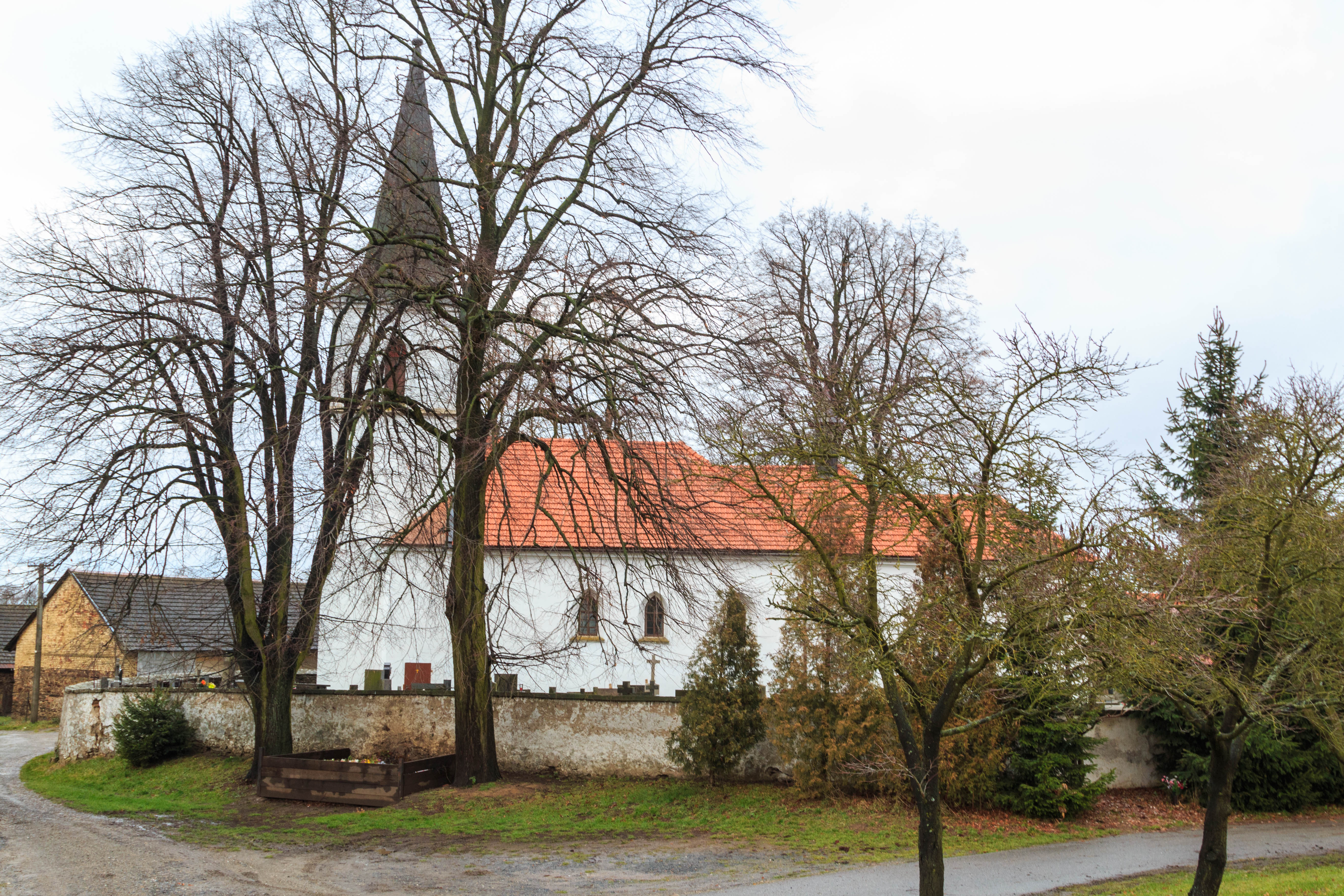 Kněž kostel